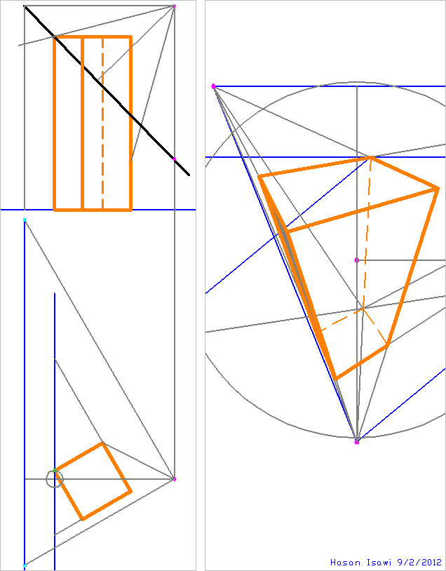 prospettiva a quadro inclinato vista dall'alto